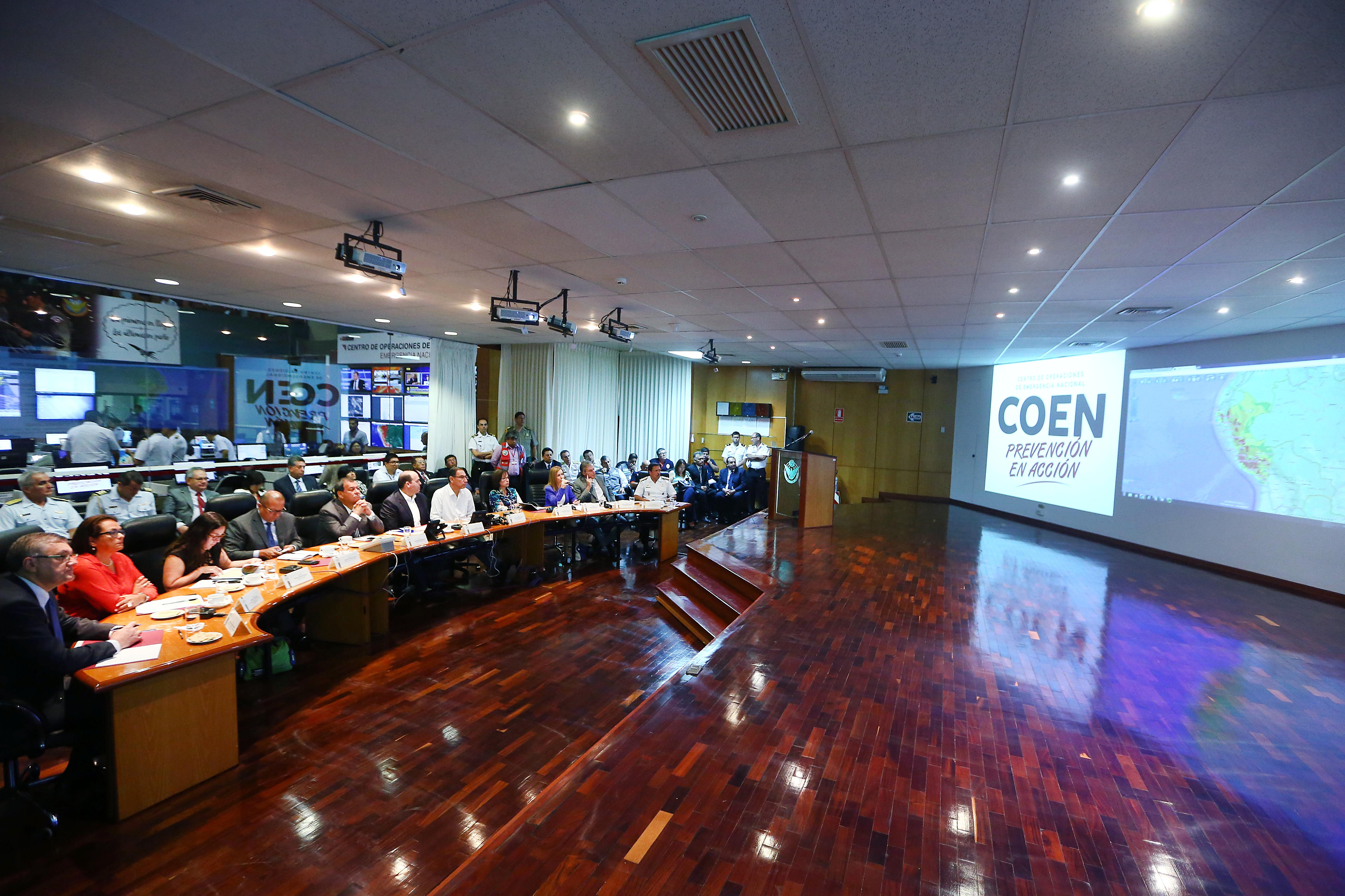 Ministro de Defensa del Perú participando en reunión informativa del COEN